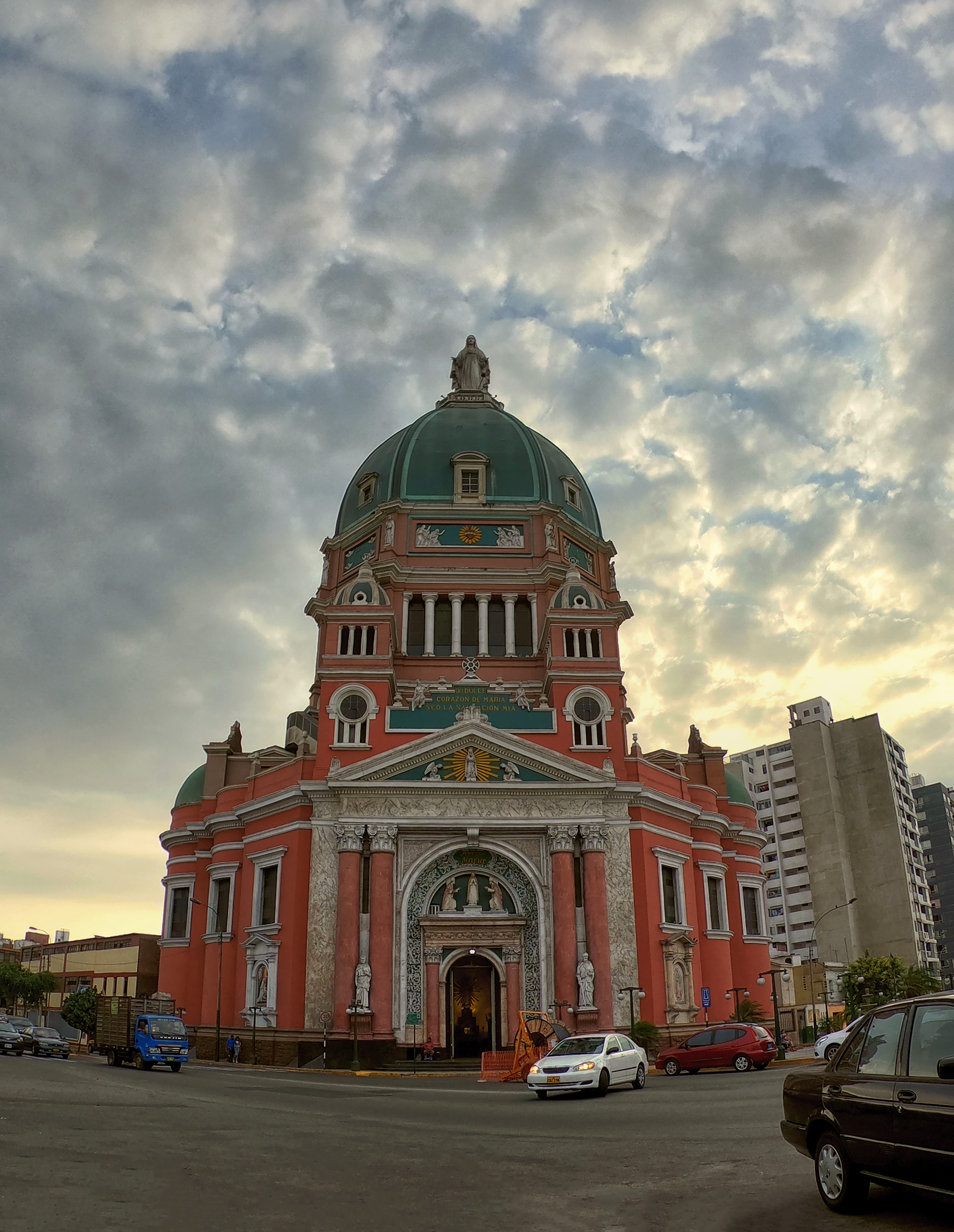 Foto de un atardecer de verano frente a la Iglesia del Inmaculado Corazón de María, tomada el martes 19 de febrero del 2019 a las 6 de la tarde.